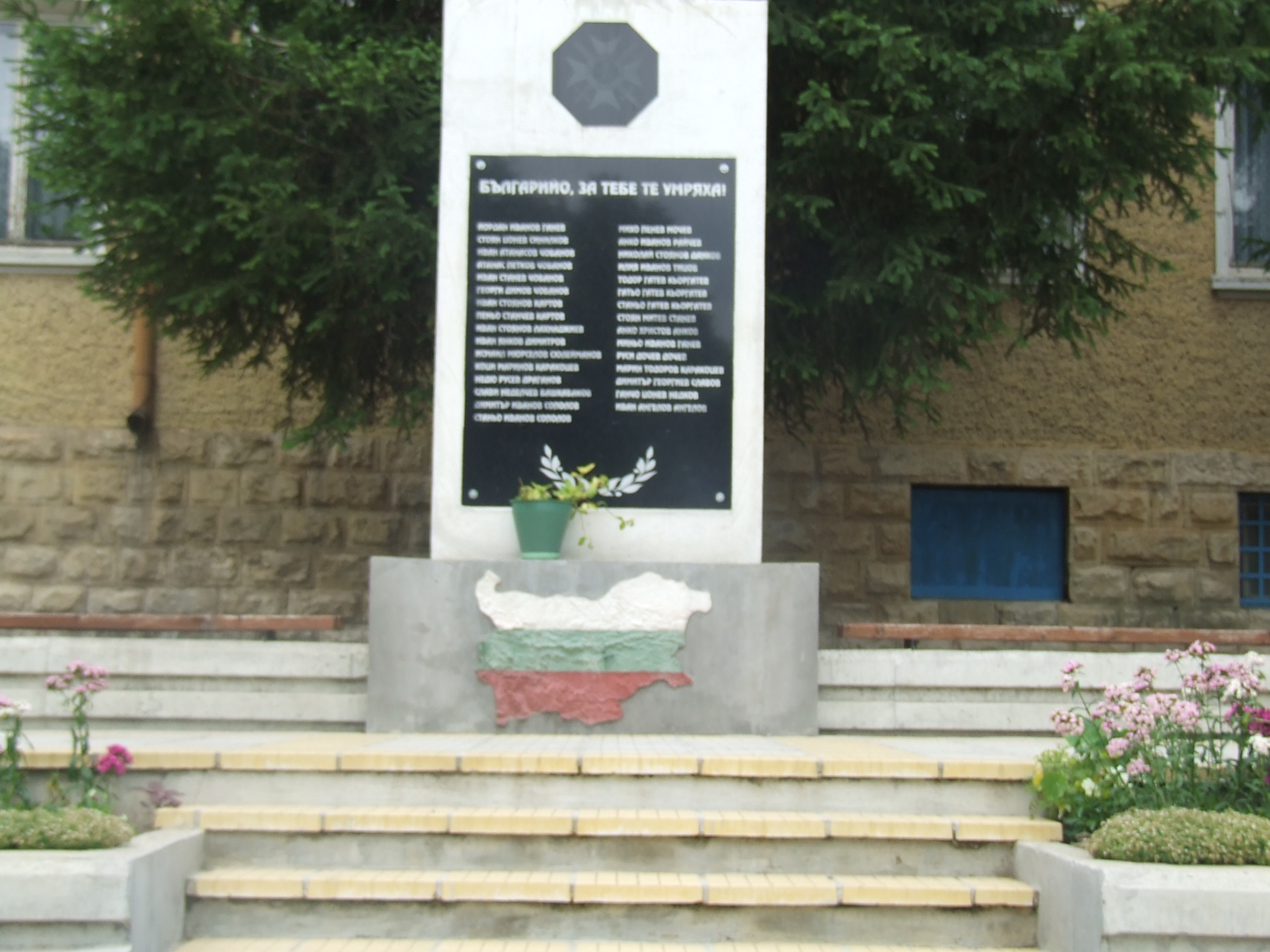 Паметникът, посветен на загиналите жители на село Захари Стояново, Поповско във войните за национално обединение - 2007 год.